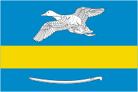 Флаг Екатериновского сельского поселения, Краснодарский край, Россия.